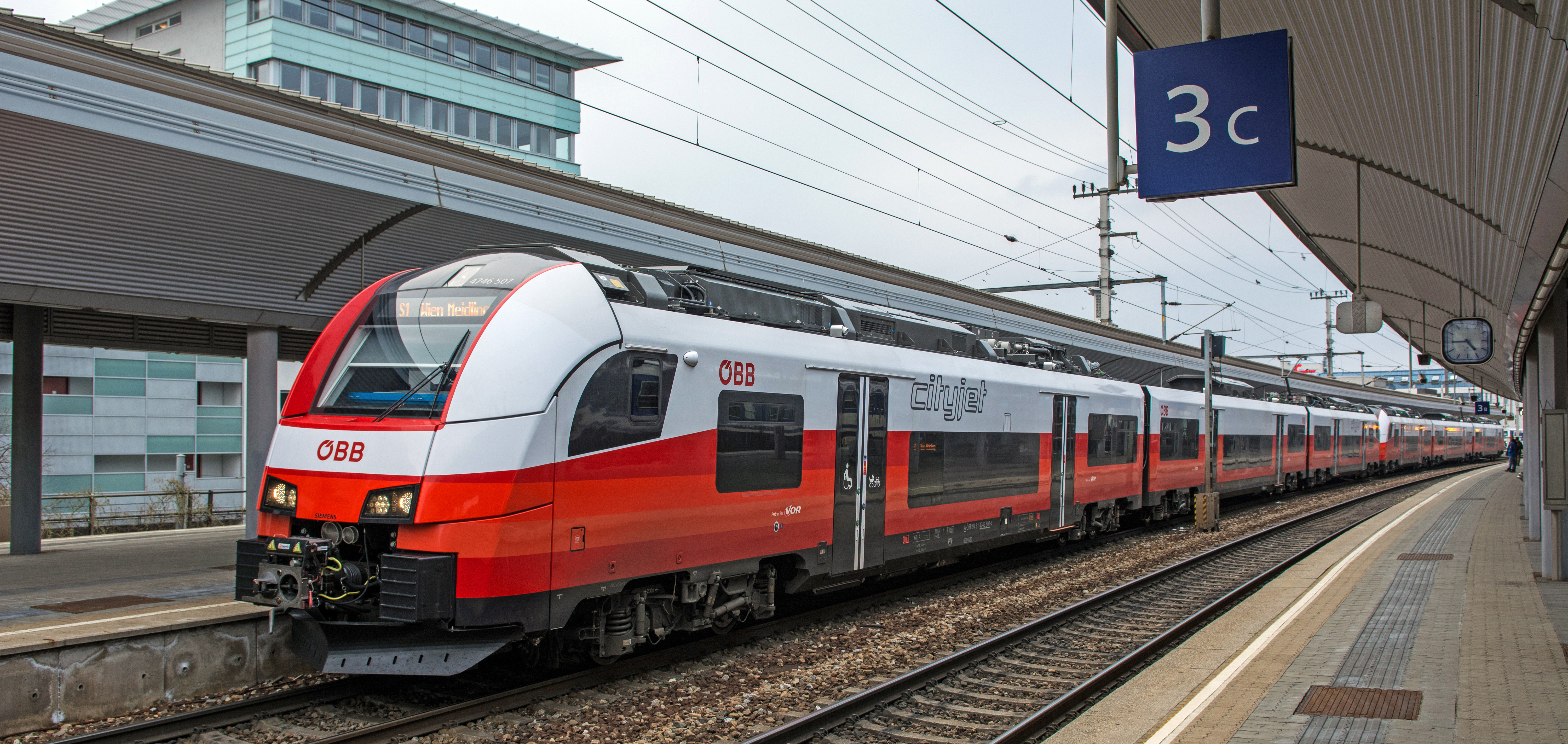 Bild des Cityjet